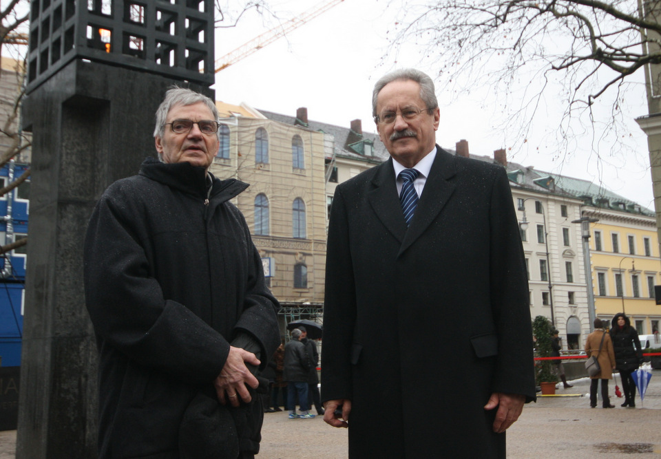 Andreas Sobeck (li.) und Münchens OB Christian Ude am 27.01.2014 auf dem Platz der Opfer des Nationalsozialismus in München. An diesem Tag wurde die Flamme im Denkmal (von Andreas Sobeck) für die Opfer der NS-Gewaltherrschaft als Ewiges Licht entzündet. Der Platz war in den letzten Monaten unter Mitwirkung von Andreas Sobeck umgestaltet worden und erst damit zu einer erntshaften und würdigen Gedenkstätte.